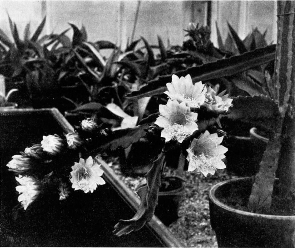 Weberocereus toundzii (Hylocereeae; Cactaceae; Planta) Nathaniel Lord Britton és Joseph Nelson Rose "The Cactaceae" c. könyvéből Werckleocereus toundzii néven